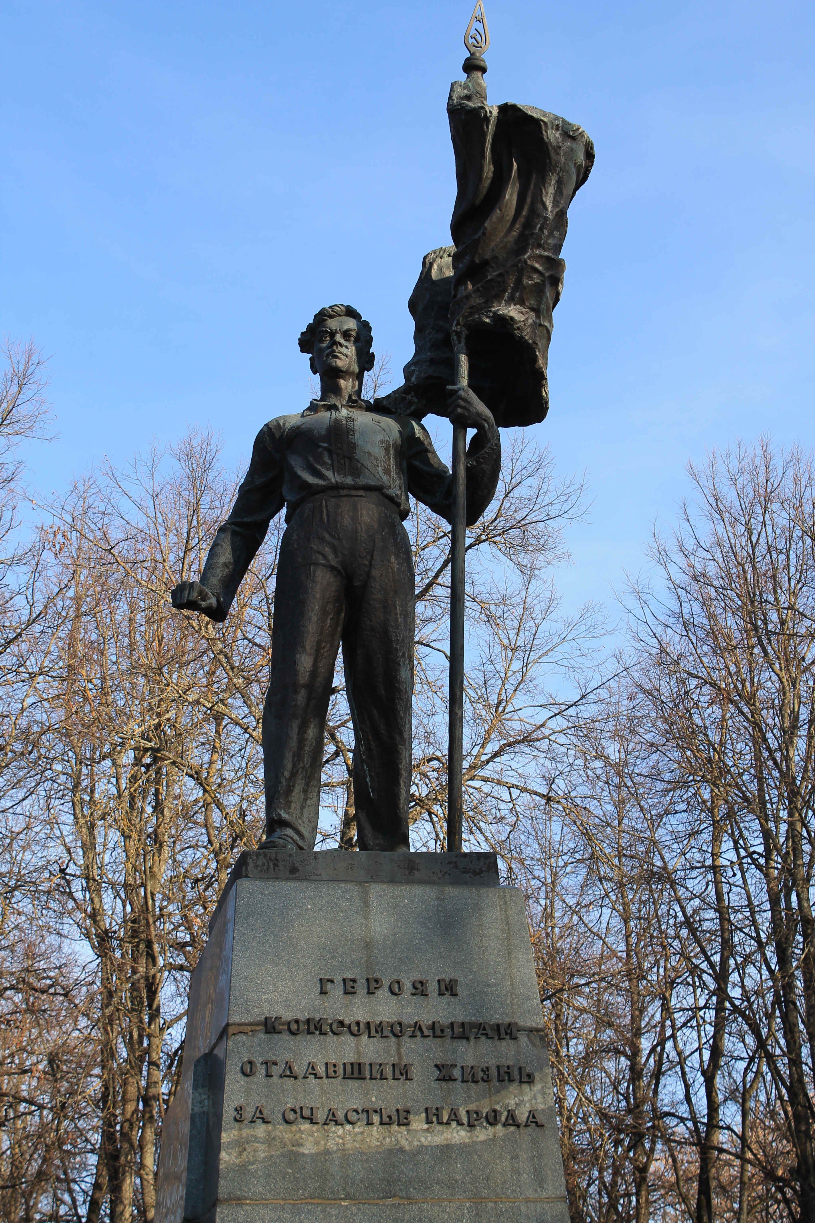 Памятник комсомольцам Людиновской комсомольской подпольной организации, погибшим в борьбе с немецко-фашистскими захватчиками в годы ВОВ (Калужская область, Людиново, Сквер, у центральной площади города)